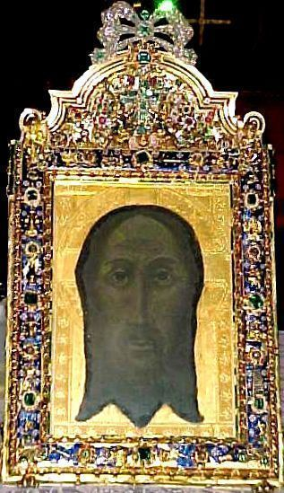 Reliquia del Santo Rostro que se guarda en la Catedral de Jaén